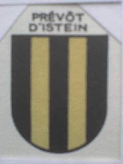 Armoiries des Etats de l'Evêché de Bâle, dont le Prévôt d'Istein faisait partie.